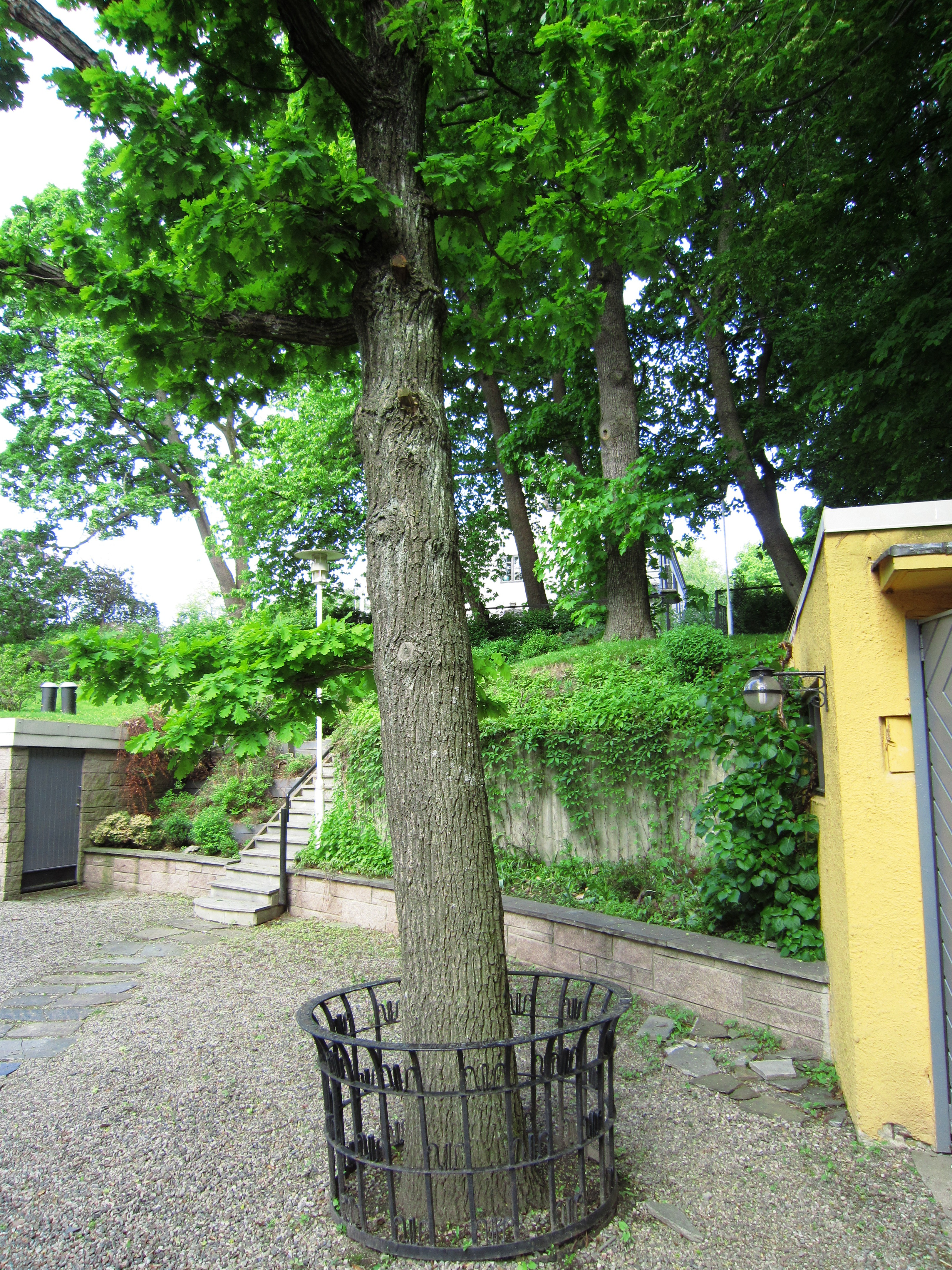 Minneeik plantet av kong Haakon og president Lauri Kr. Relander.